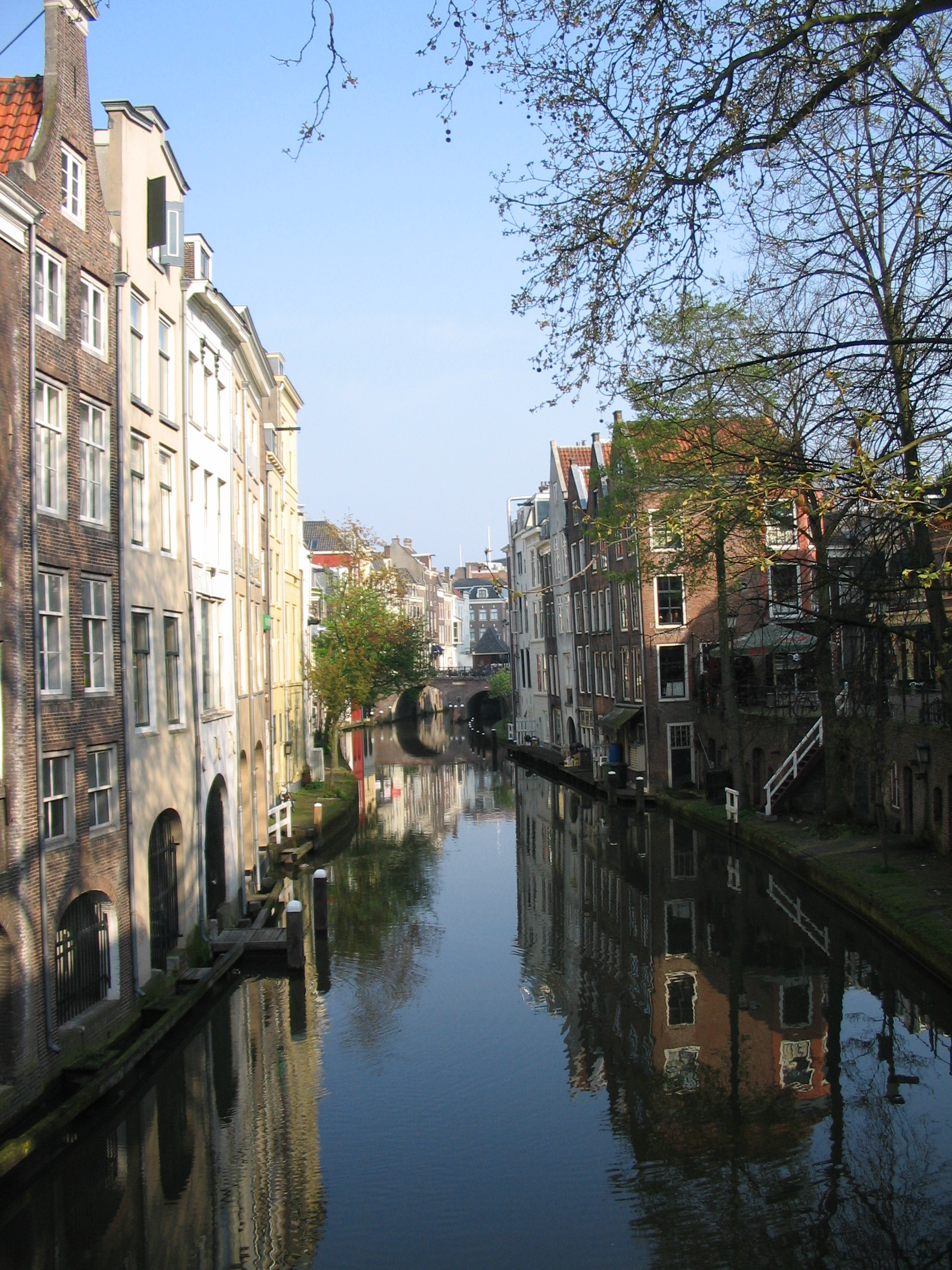 Habitations les pieds dans l'eau ; Utrecht